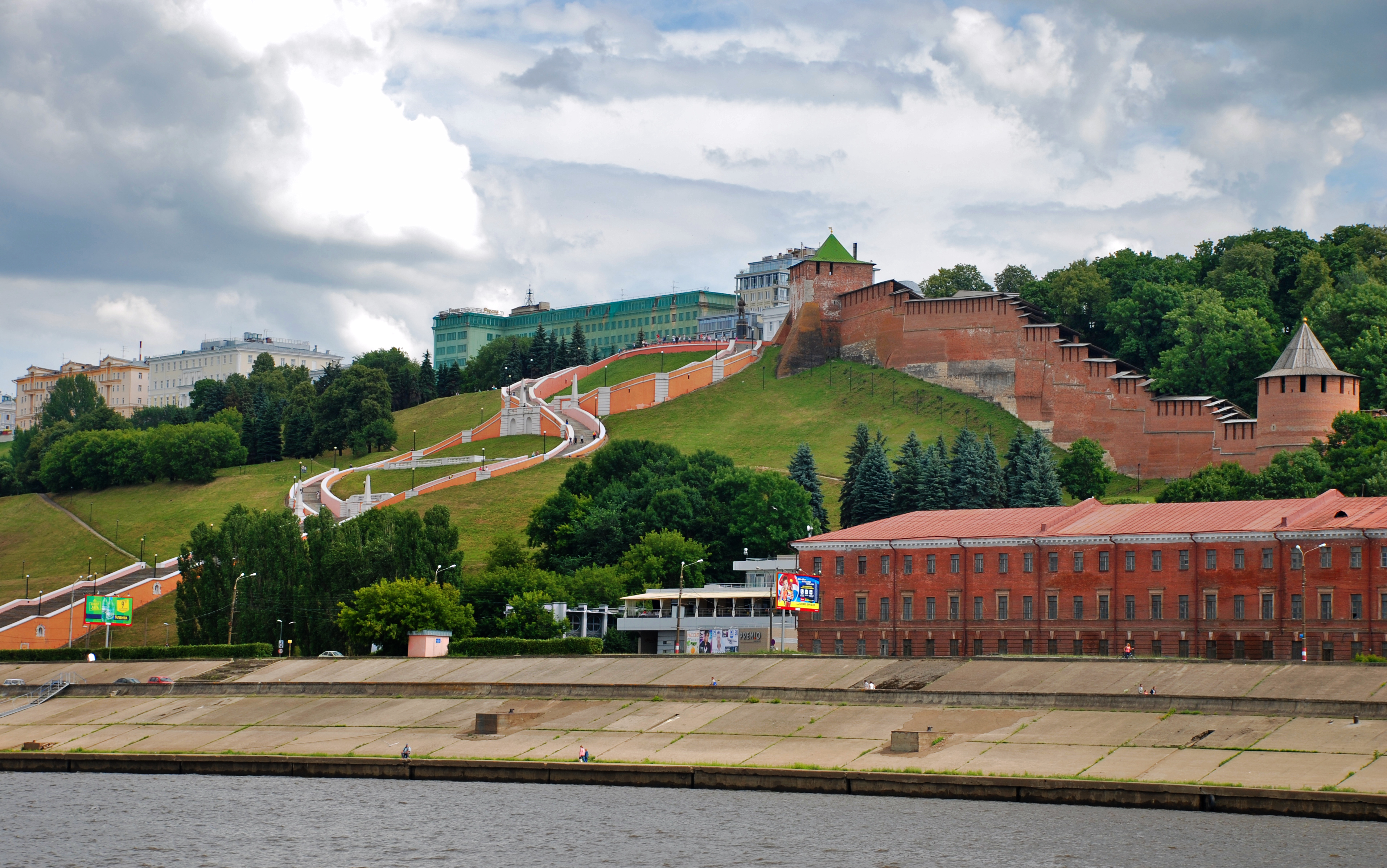 Стены (Нижегородская область, Нижний Новгород, Кремль, Минина и Пожарского площадь)